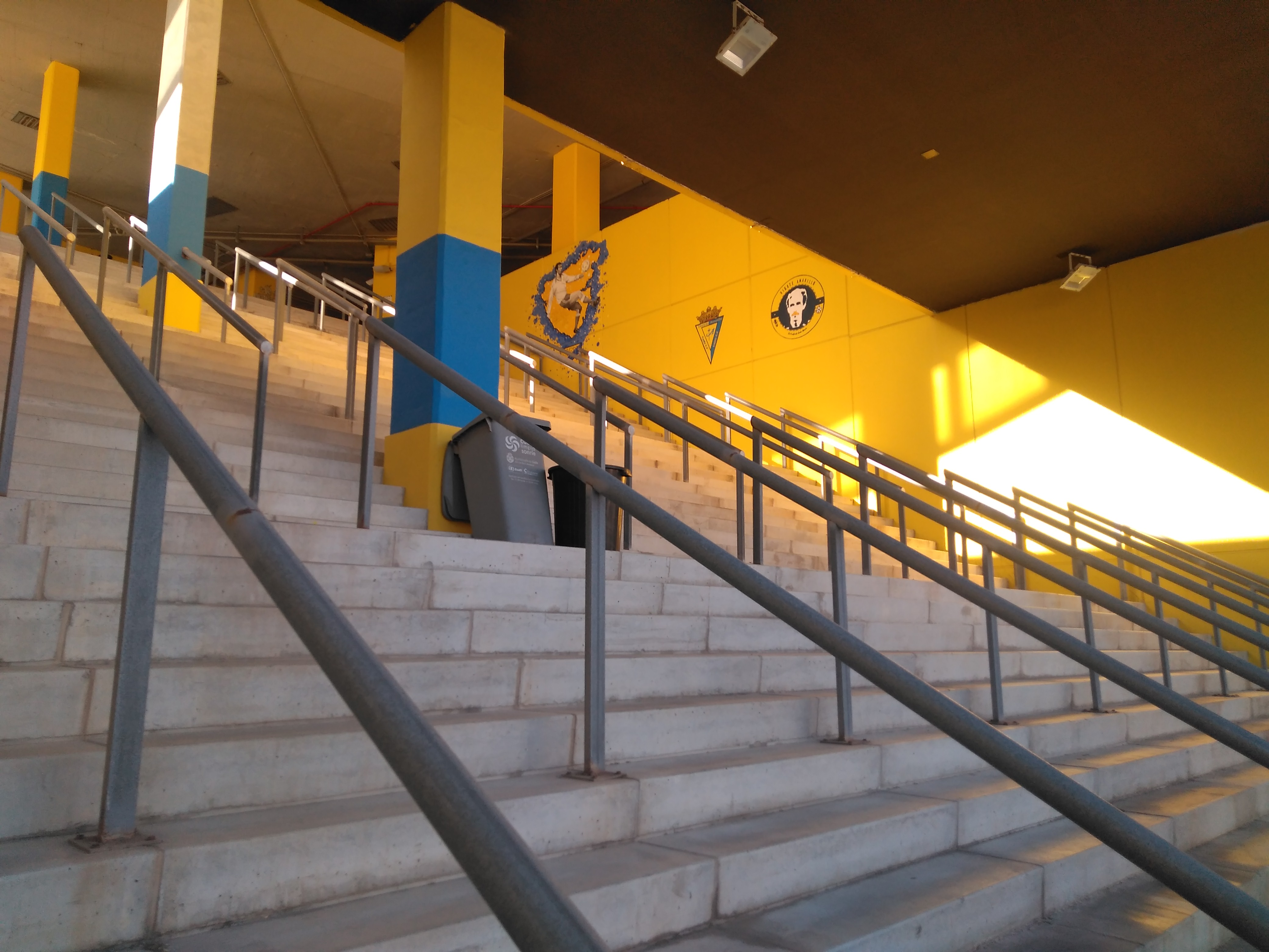 Estadio Ramón de Carranza (Cádiz, España)